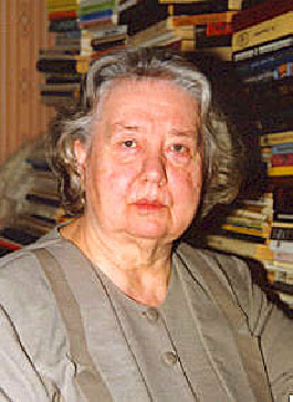 Маргарита Николаевна Кожина